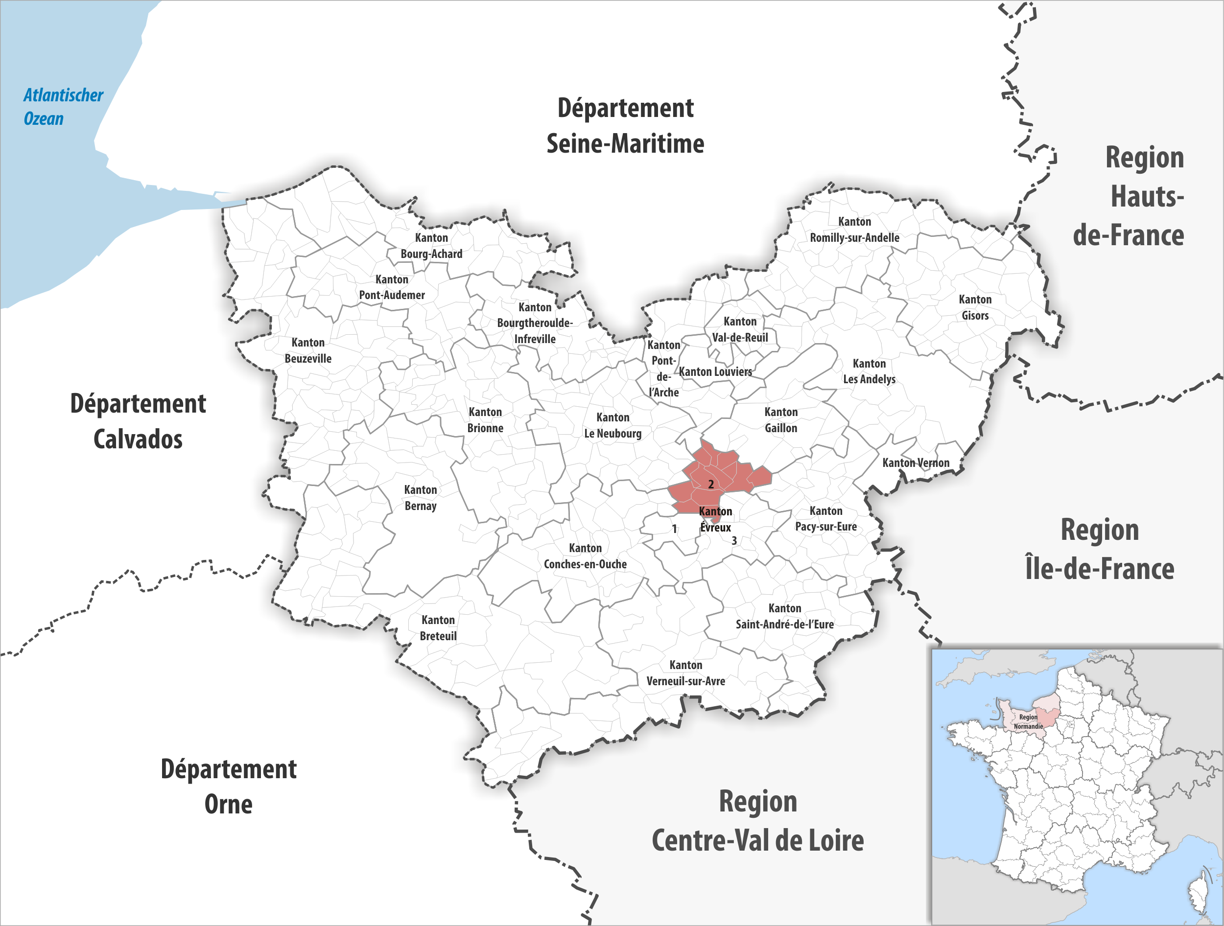 Lage des Kantons Évreux-2